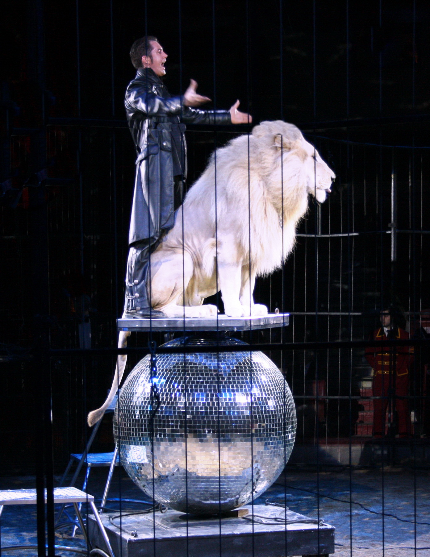 Martin Lacey jr. mit dem weißen Löwen "King Tonga"